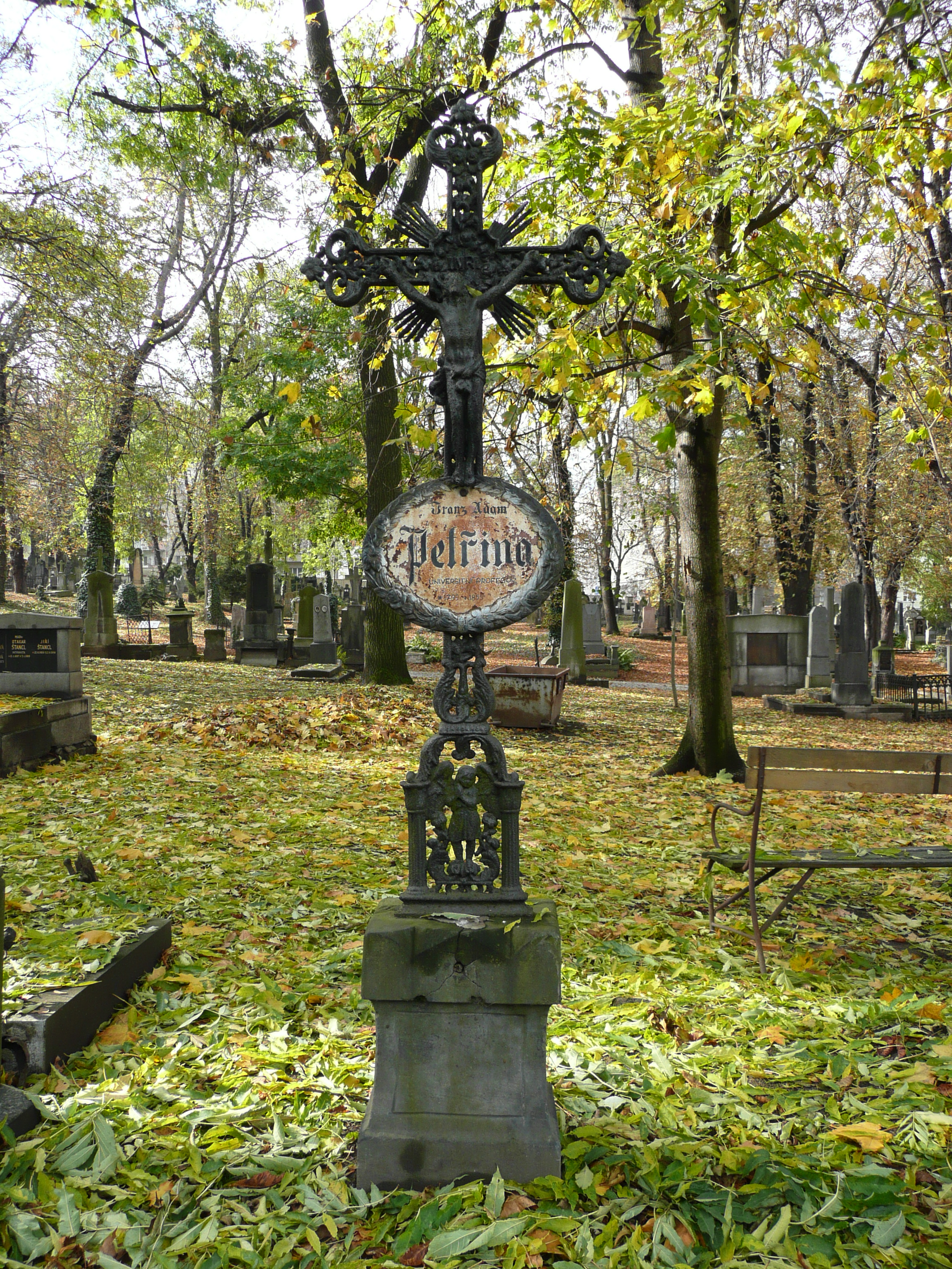 Grab von Franz Adam Petrina in Prag, Friedhof Olsansky